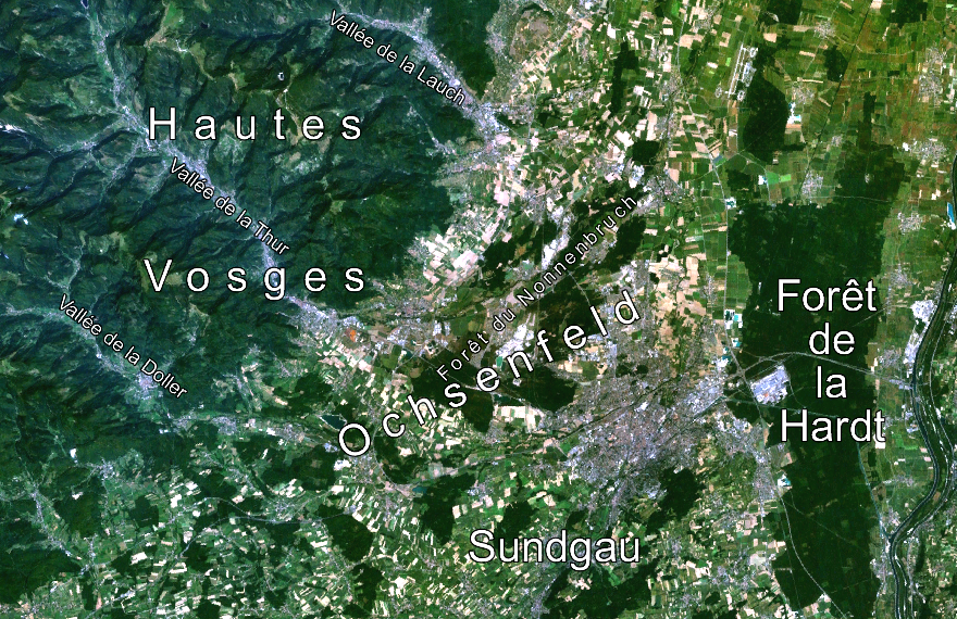 Photo satellite de la région mulhousienne annoté